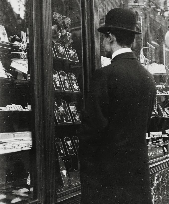 Mann vor dem Schaufenster der Fa. V. Mayer's Söhne, k. u. k. Hofjuweliere (spezialisiert auf Orden und Ehrenzeichen), Stock-im-Eisen-Platz, Wien